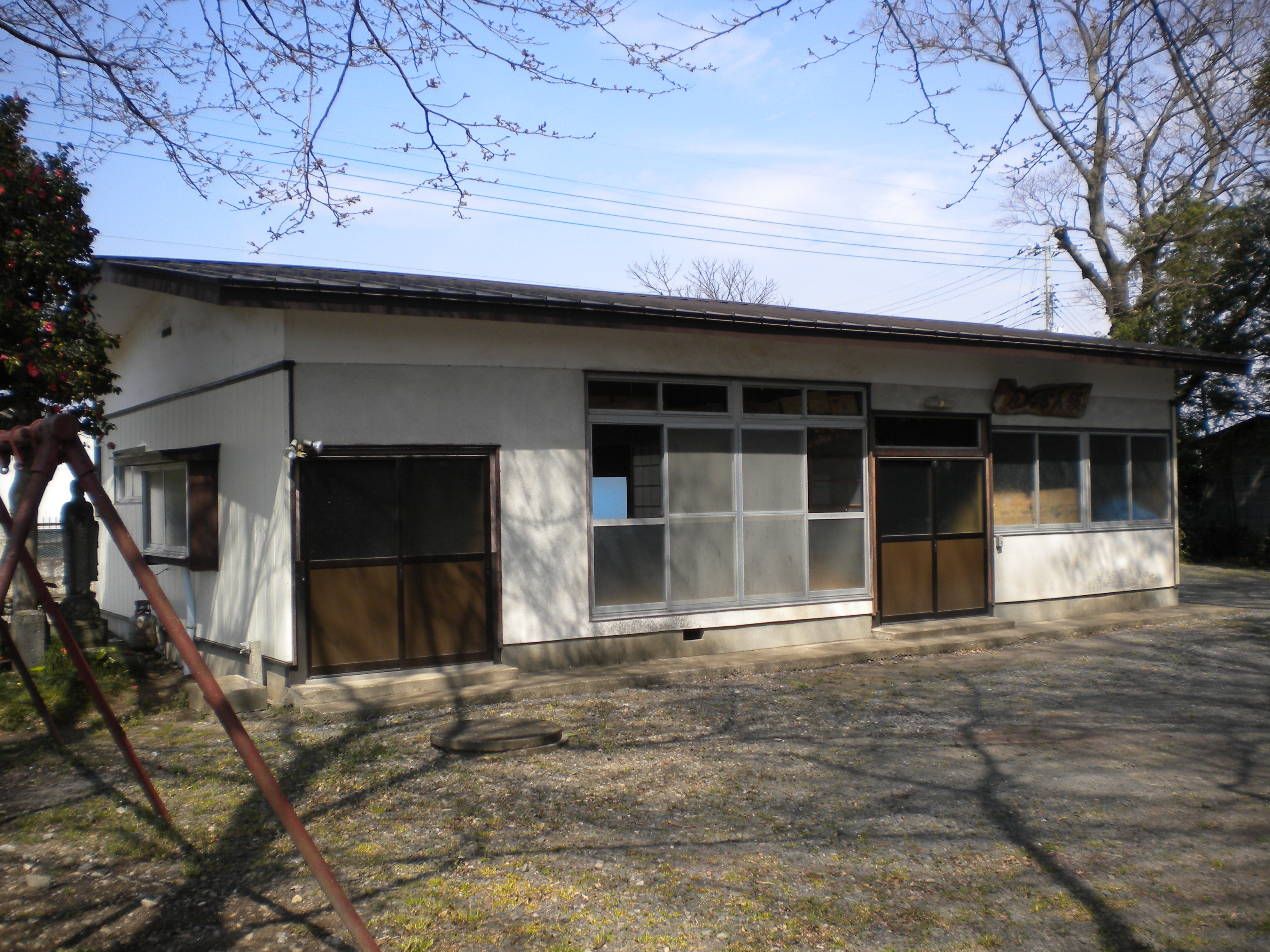 栃木県下都賀郡壬生町大字下稲葉 原坪公民館